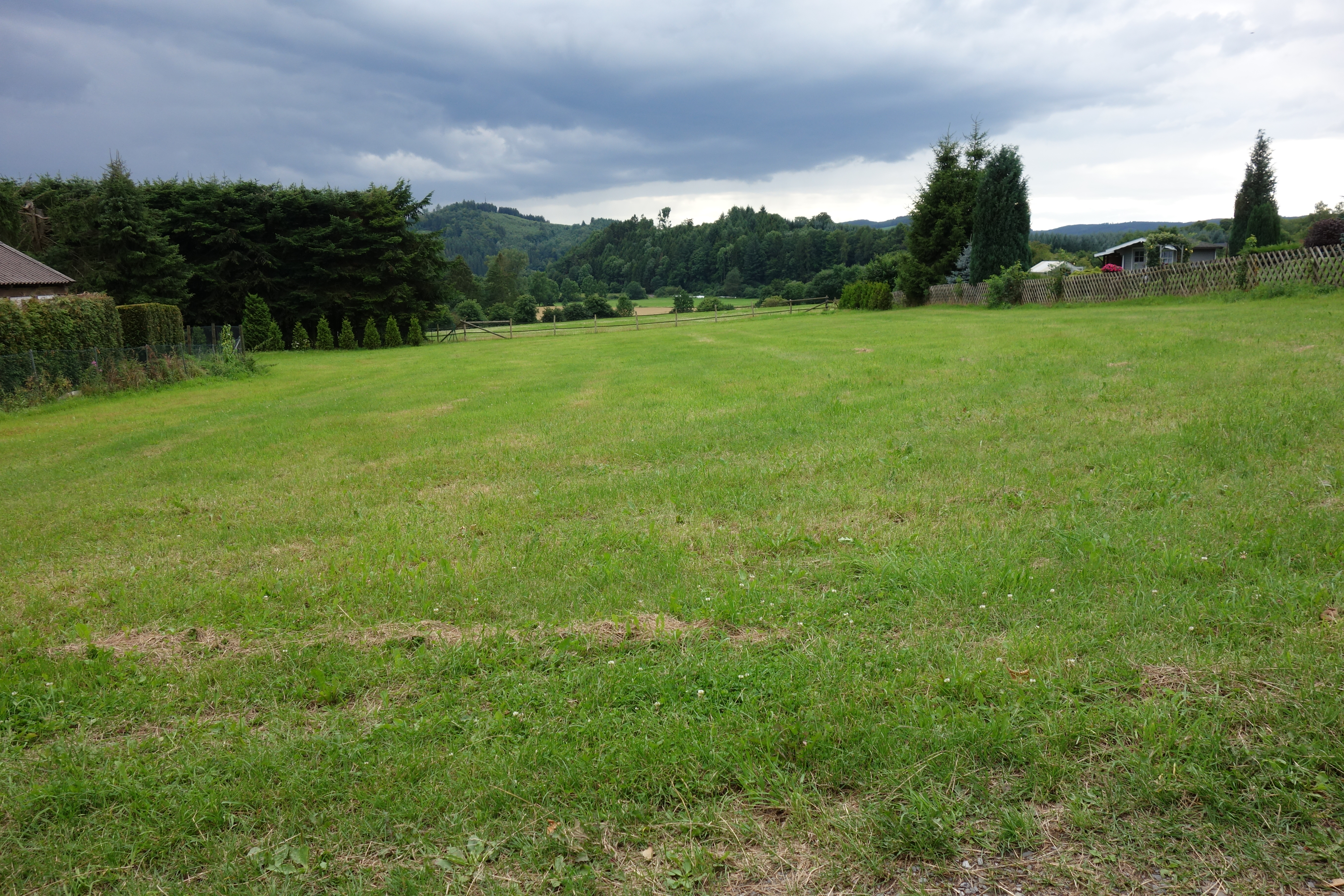 Landschaftsschutzgebiet Ortsrandlagen südlich von Stockhausen mit Dorfrand und LSG Meschede im Hintergrund.